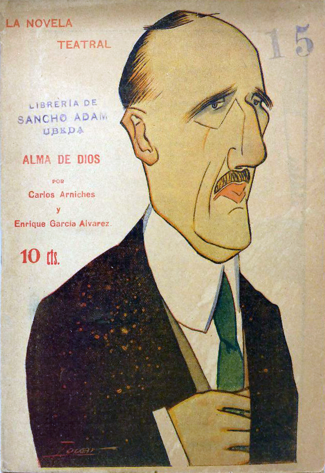 Caricatura de Carlos Arniches.